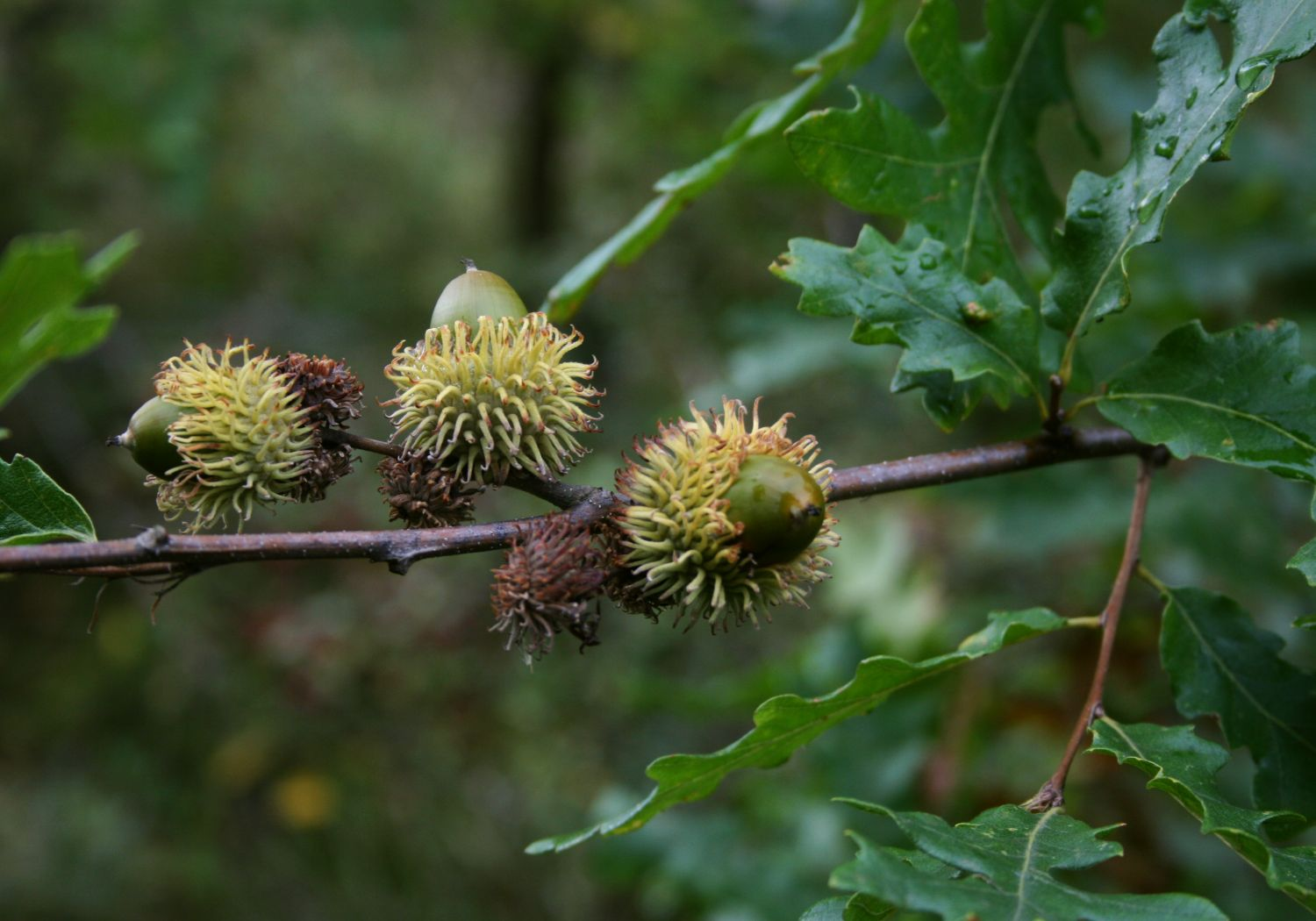 Zerr-Eiche (Quercus cerris), Buchengewächse (Fagaceae) - Österreich/Austria/Autriche: Niederösterreich, Weinviertel, „Steinbergwald“ zwischen Zistersdorf und Neusiedl an der Zaya